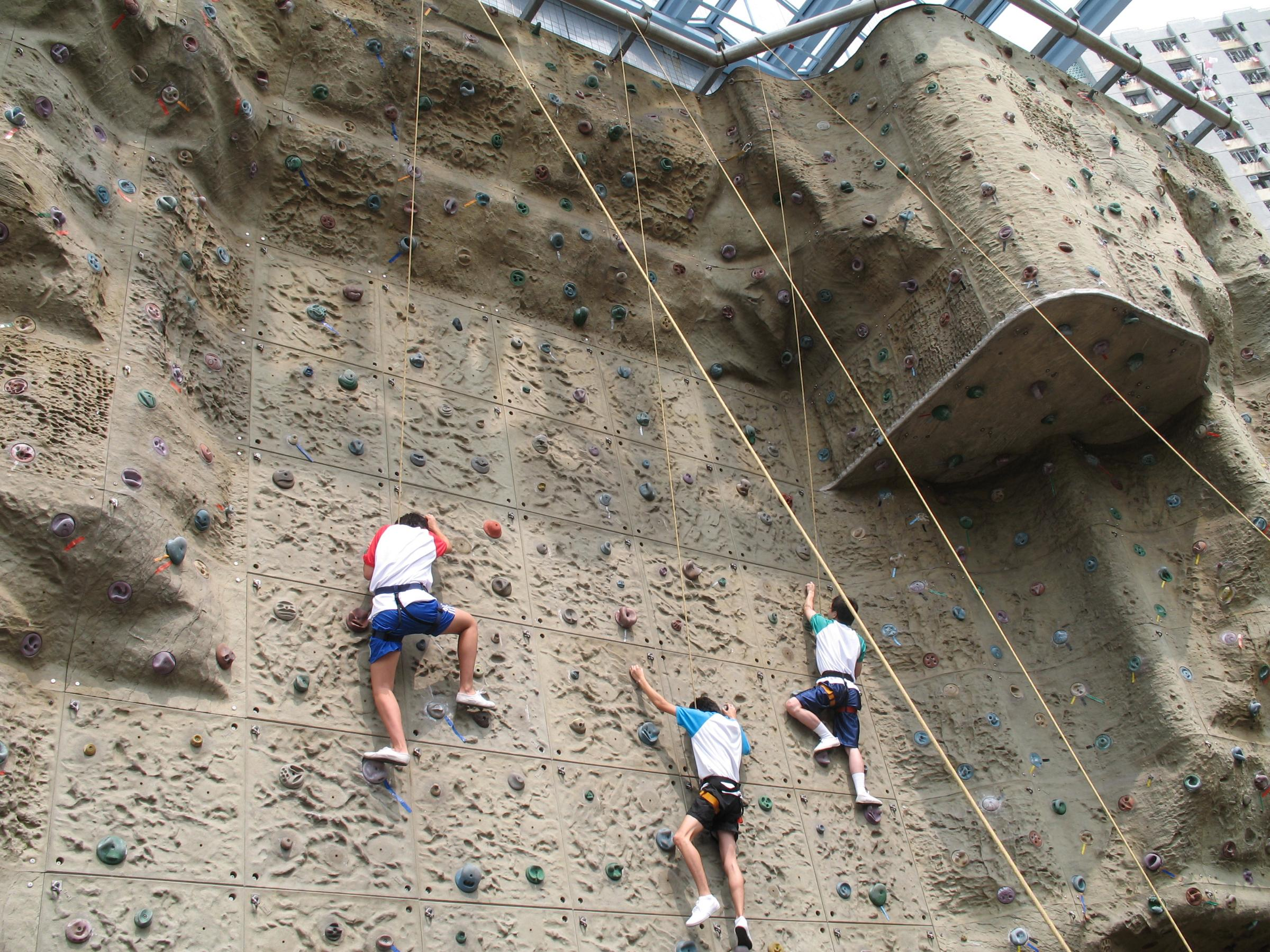 聖公會基孝中學 (SKH Kei Hau Secondary School). Author= DHauSing